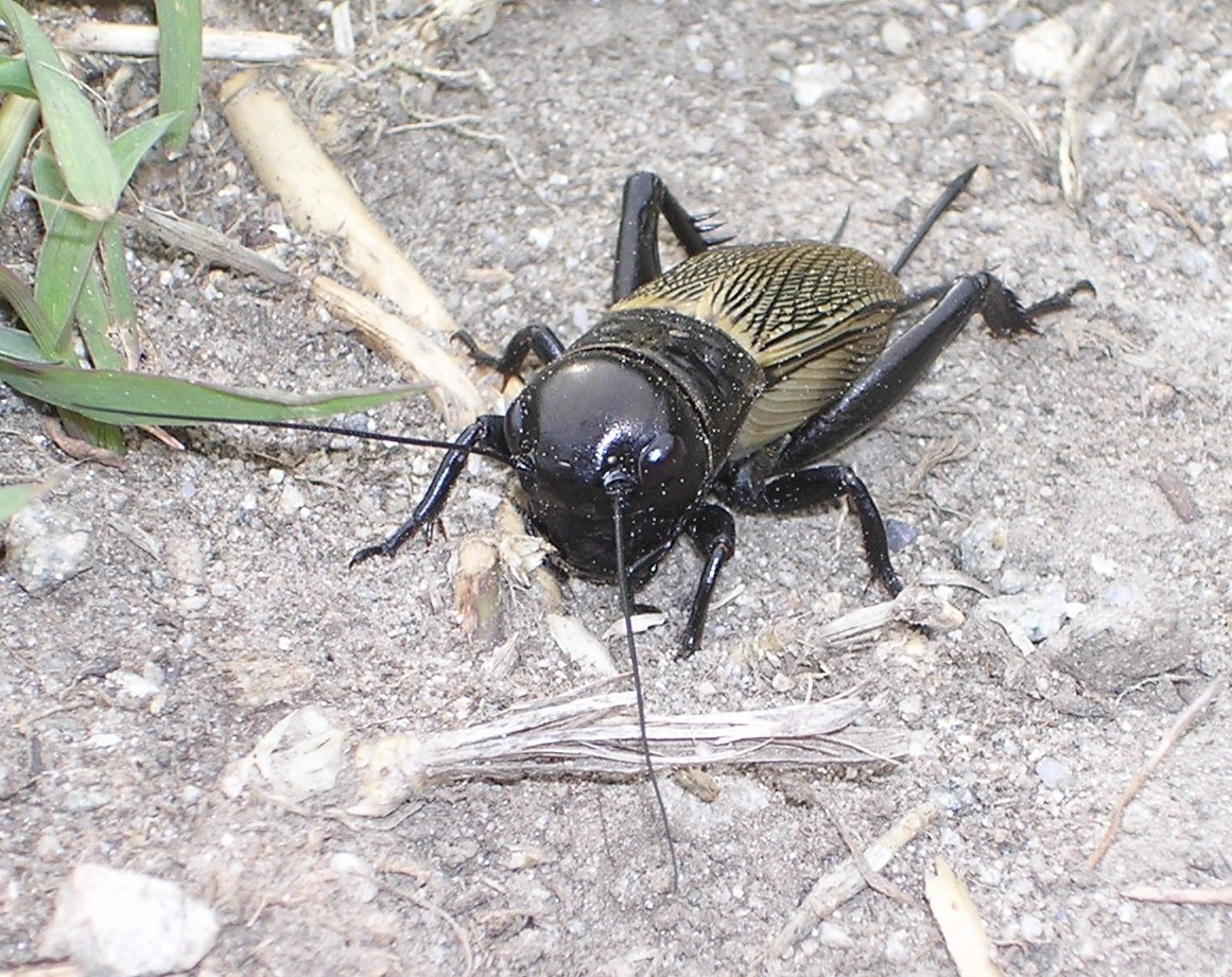 Hembra de Gryllus campestrisLatina: Gryllus campestris